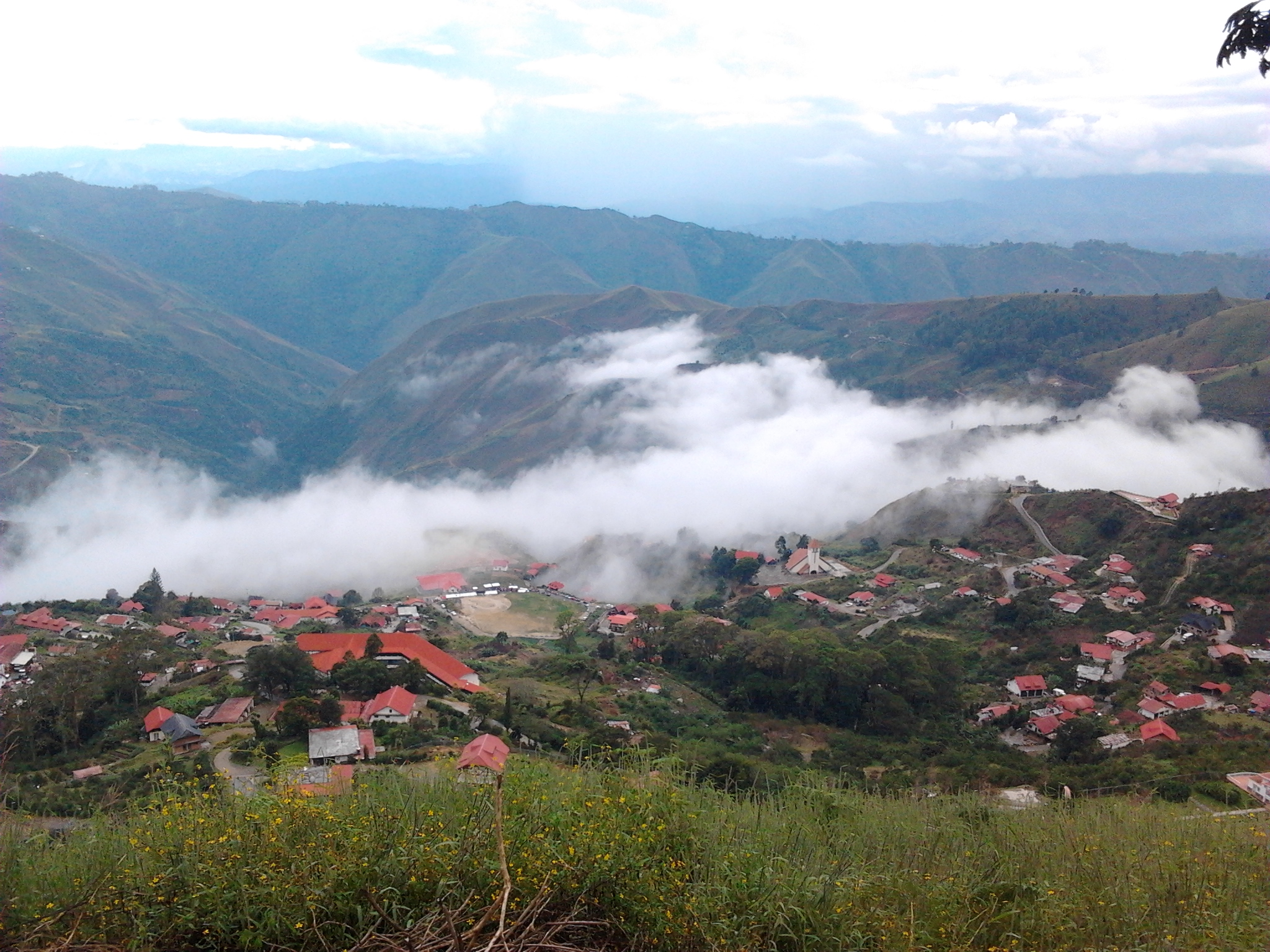 Bella vista del jarillo, su clima... el mejor de la zona